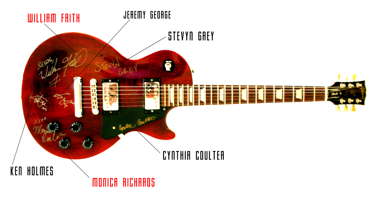 Chitarra elettrica Gibson Les Paul autografata dal gruppo musicale Faith and the Muse